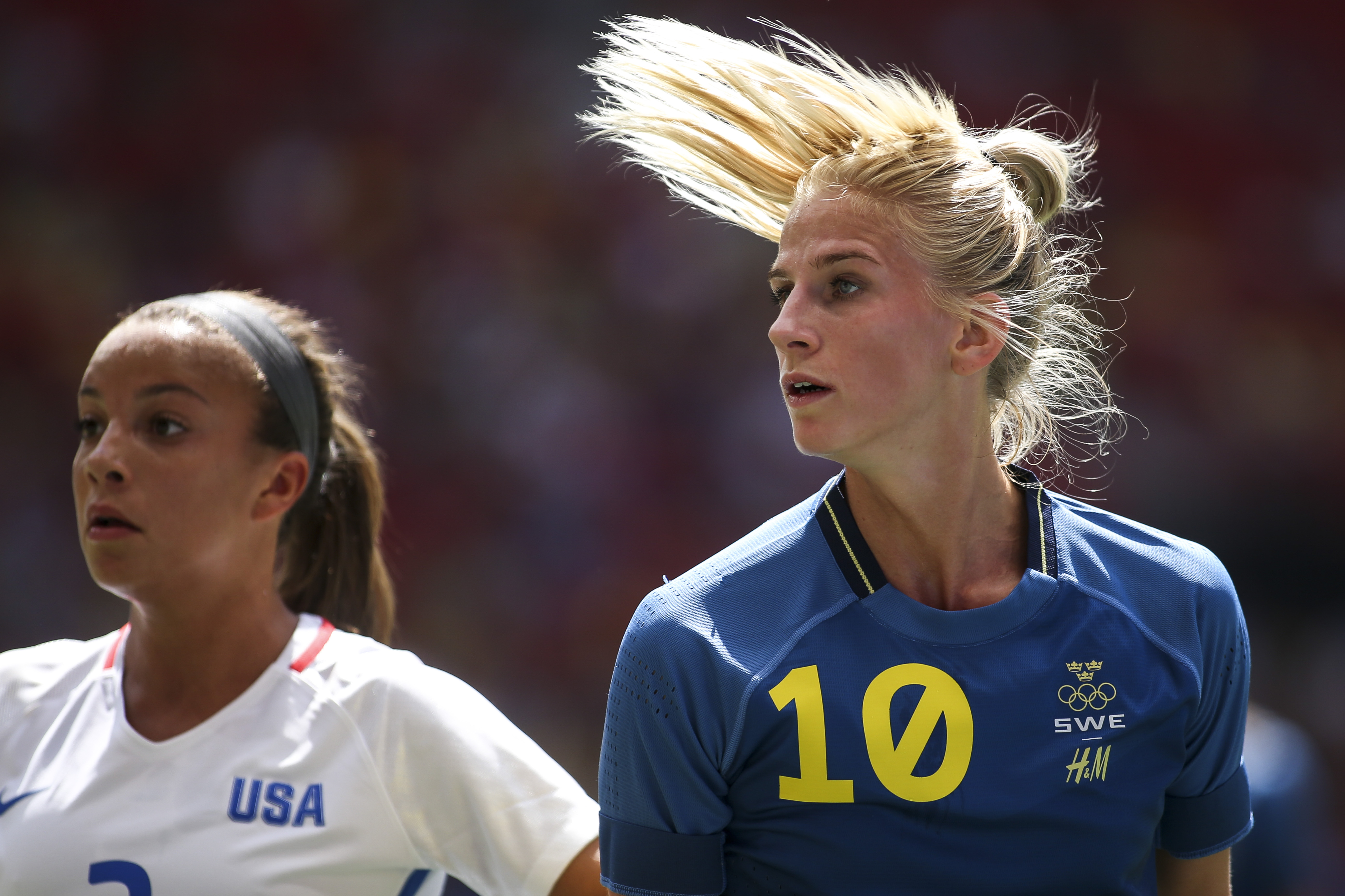 Brasília - A seleção dos Estados Unidos enfrenta a seleção da Suécia pelas quartas de final do futebol feminino, no estádio Mané Garrincha (Marcelo Camargo/Agência Brasil)